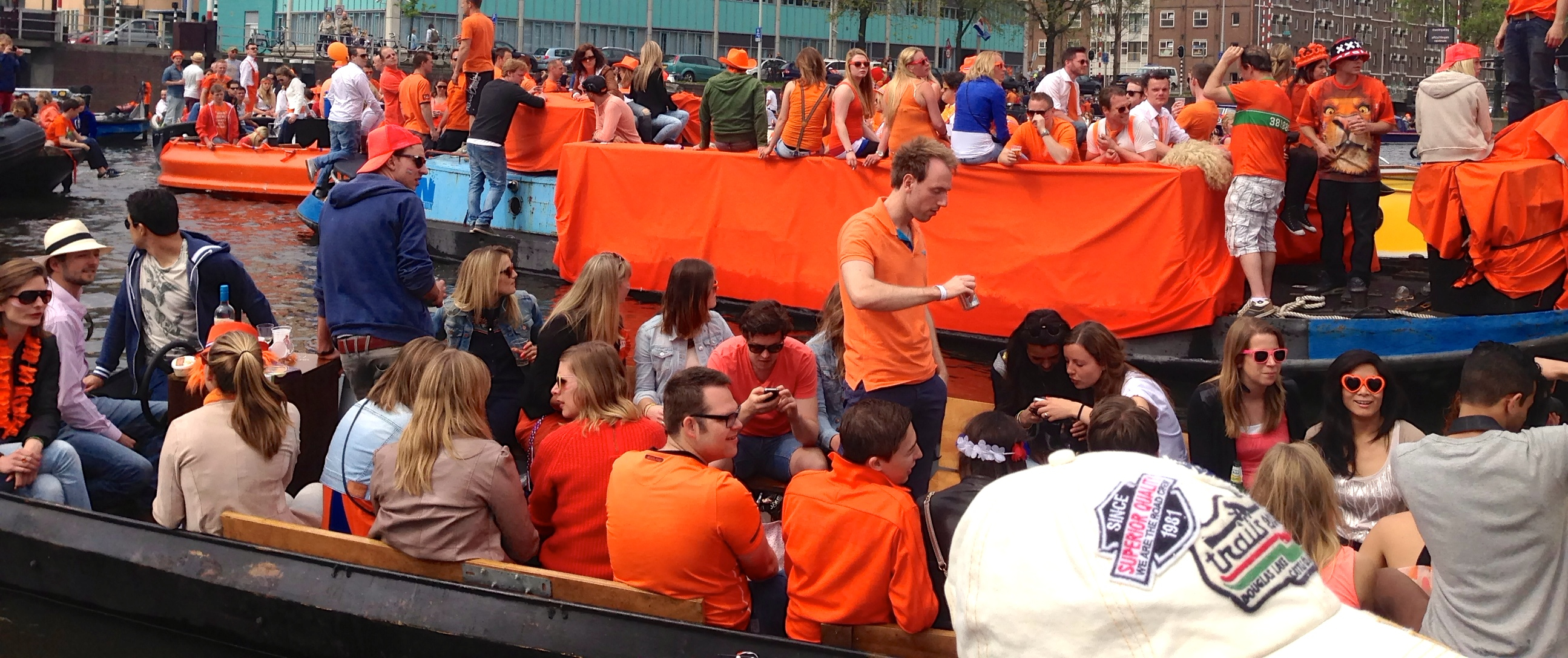 Oranje boten op Koningsdag in de Korte Zoutkeetsgracht te Amsterdam, waar een versmalling was gemaakt om de toevloed van boten richting Prinsengracht te doseren.